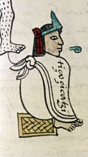 Ausschnitt einer Abbildung aus dem Codex Mendoza. Die Azteken sympolisierten den Akt des Sprechens (Sprechakt, speech act) durch ein Luftwölkchen, nicht unähnlich den Sprechblasen der Comics.